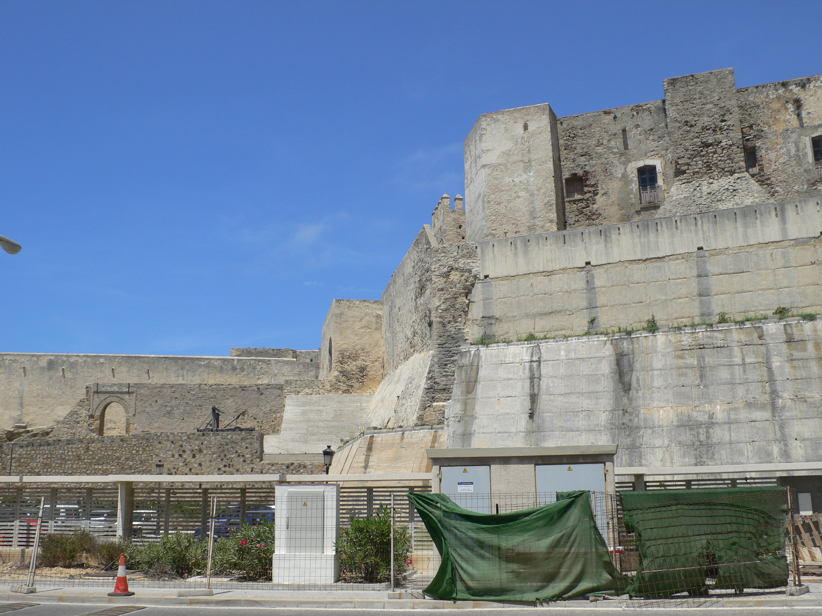 Castillo de Tarifa